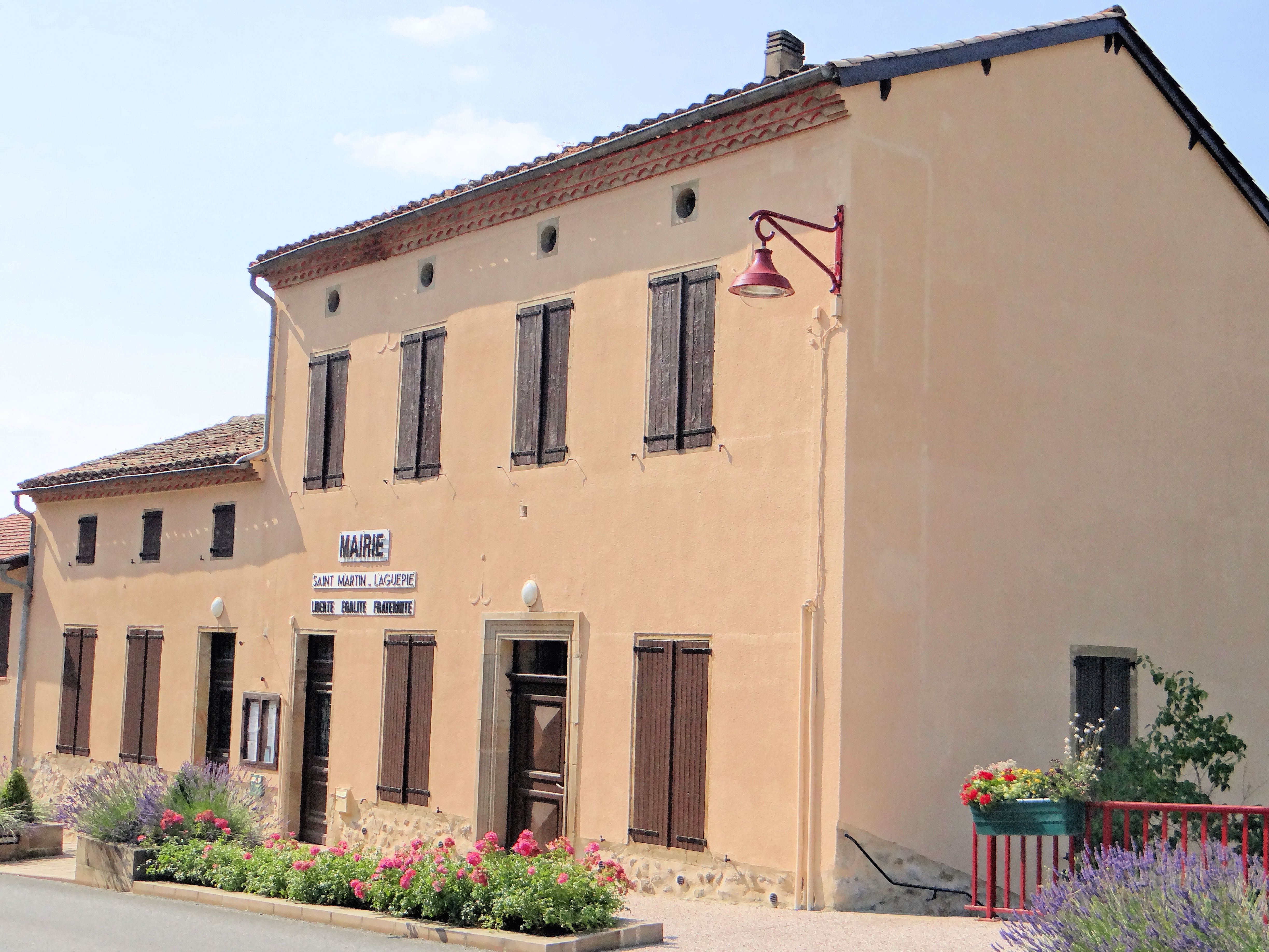 Saint-Martin-Laguépie - Mairie